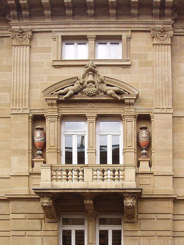 Detailansicht der Fassade der Villa Link, Cäcilienstr. 51 in Heilbronn.